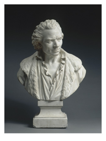 Werk von Charles De Wailly